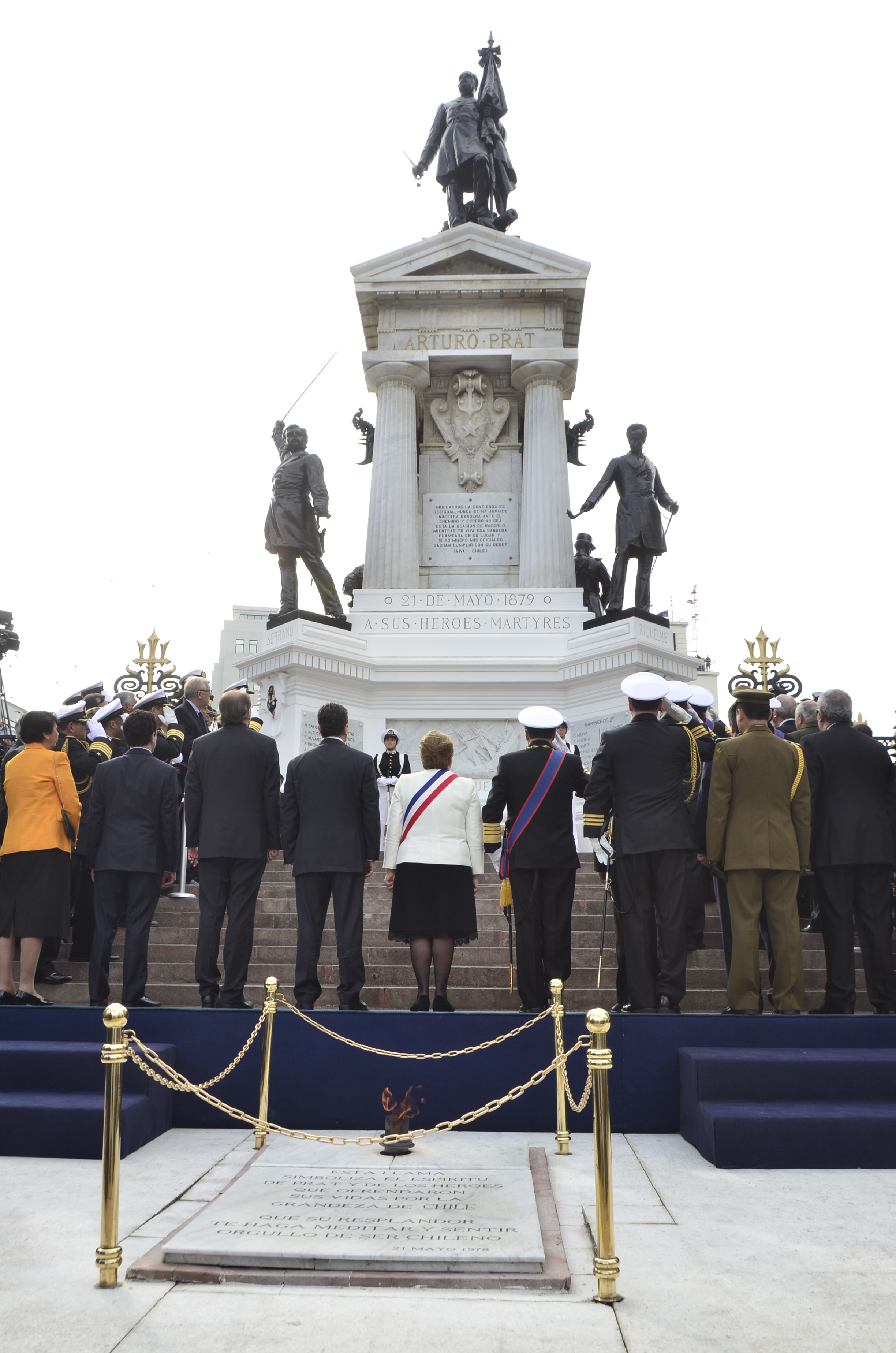 Ceremonia 21 de Mayo